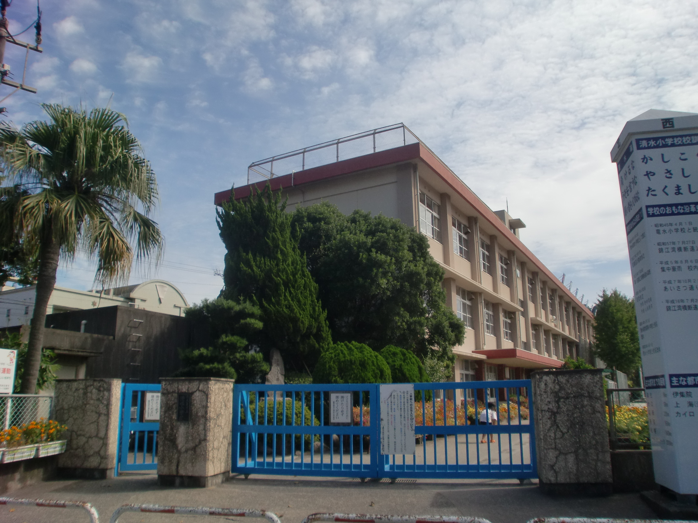 鹿児島市立清水小学校の外観。